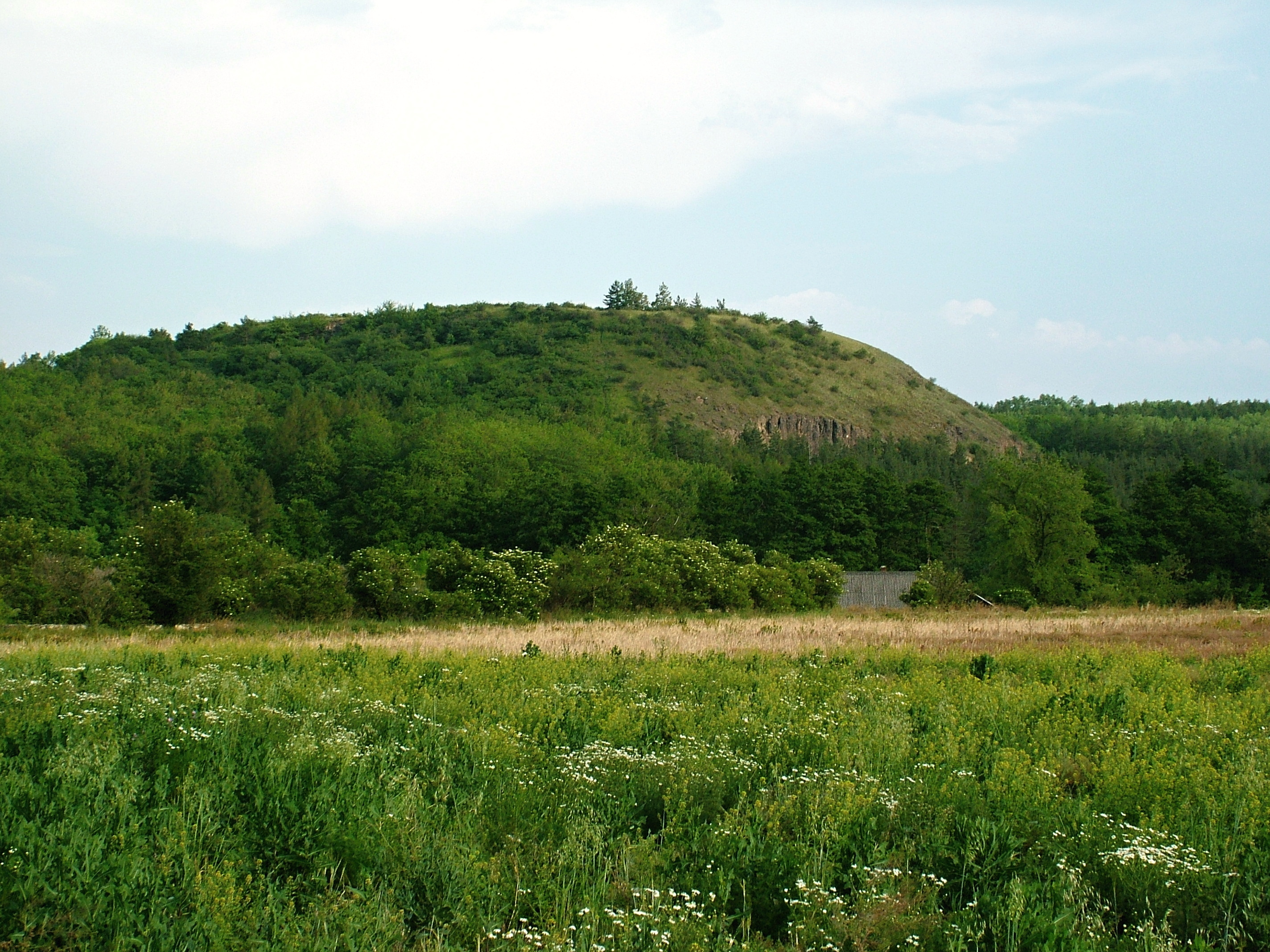 Strmé svahy a náhorní plošina.